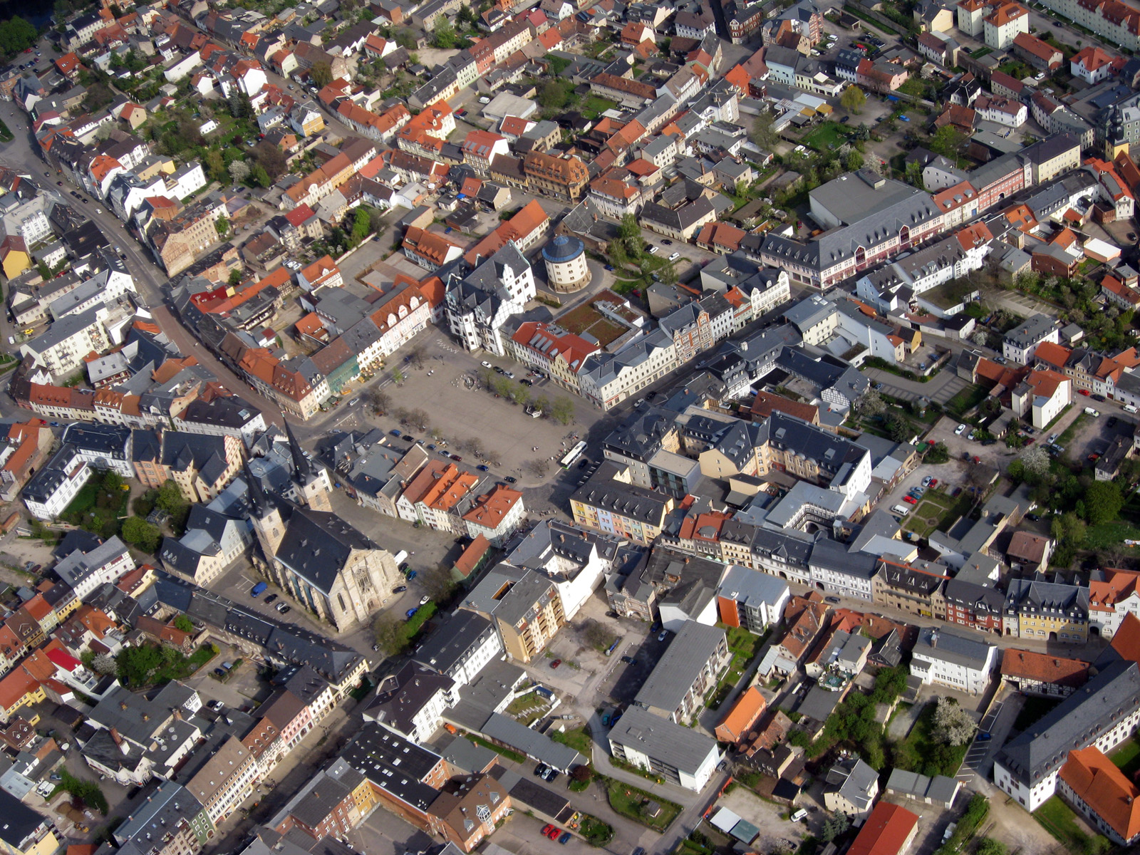 Luftbild Marktplatz Saalfeld/Saale